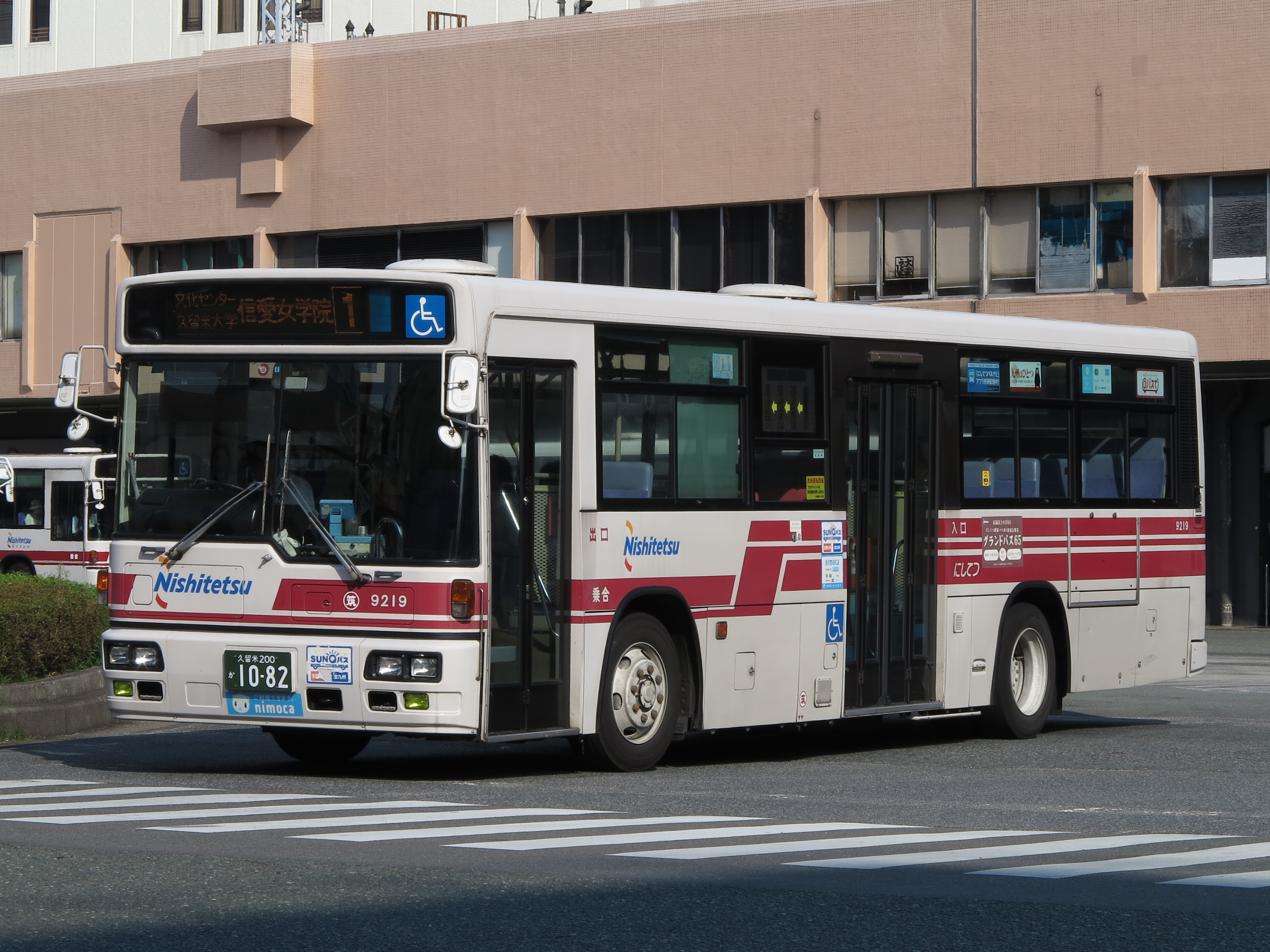 西鉄バス9219号車 久留米200か10-82（西鉄バス久留米・筑後車庫所属）